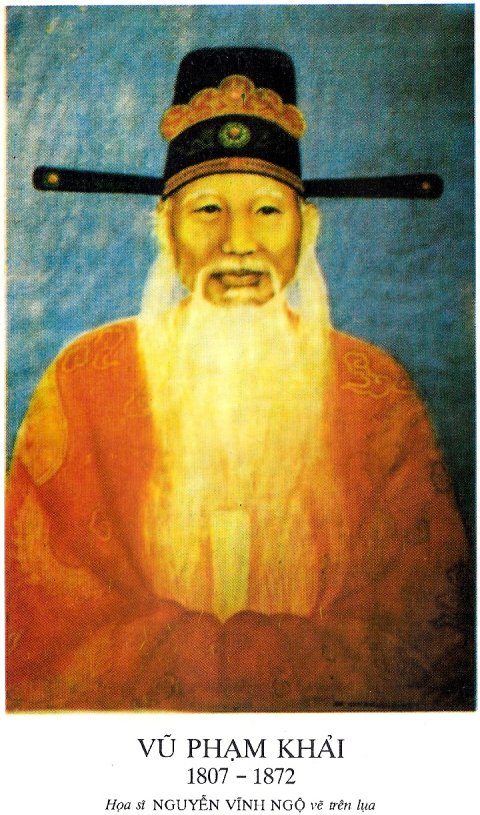 Tranh vẽ chân dung Vũ Phạm Khải (1807 - 1872), một vị quan tiến bộ và là nhà thơ nổi tiếng triều Nguyễn.